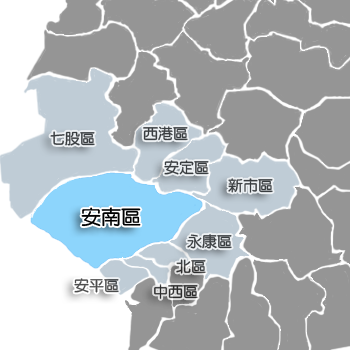 臺南市安南區相對位置。